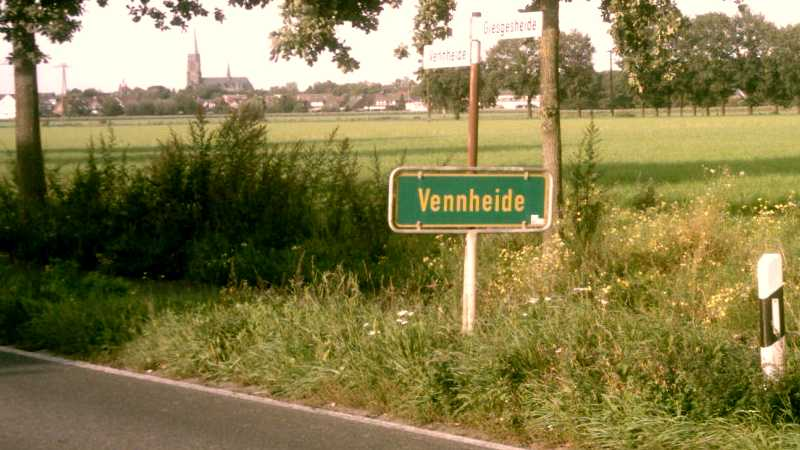 Grüne Ortshinweistafel, Zeichen 385 StVO, an der Grenze Vennheide/Giesgesheide am Rand der Kreisstraße 17 in Willich-Vennheide im nordrhein-westfälischen Kreis Viersen.